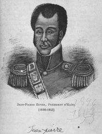 Portrait du président d'Haïti Jean-Pierre Boyer.